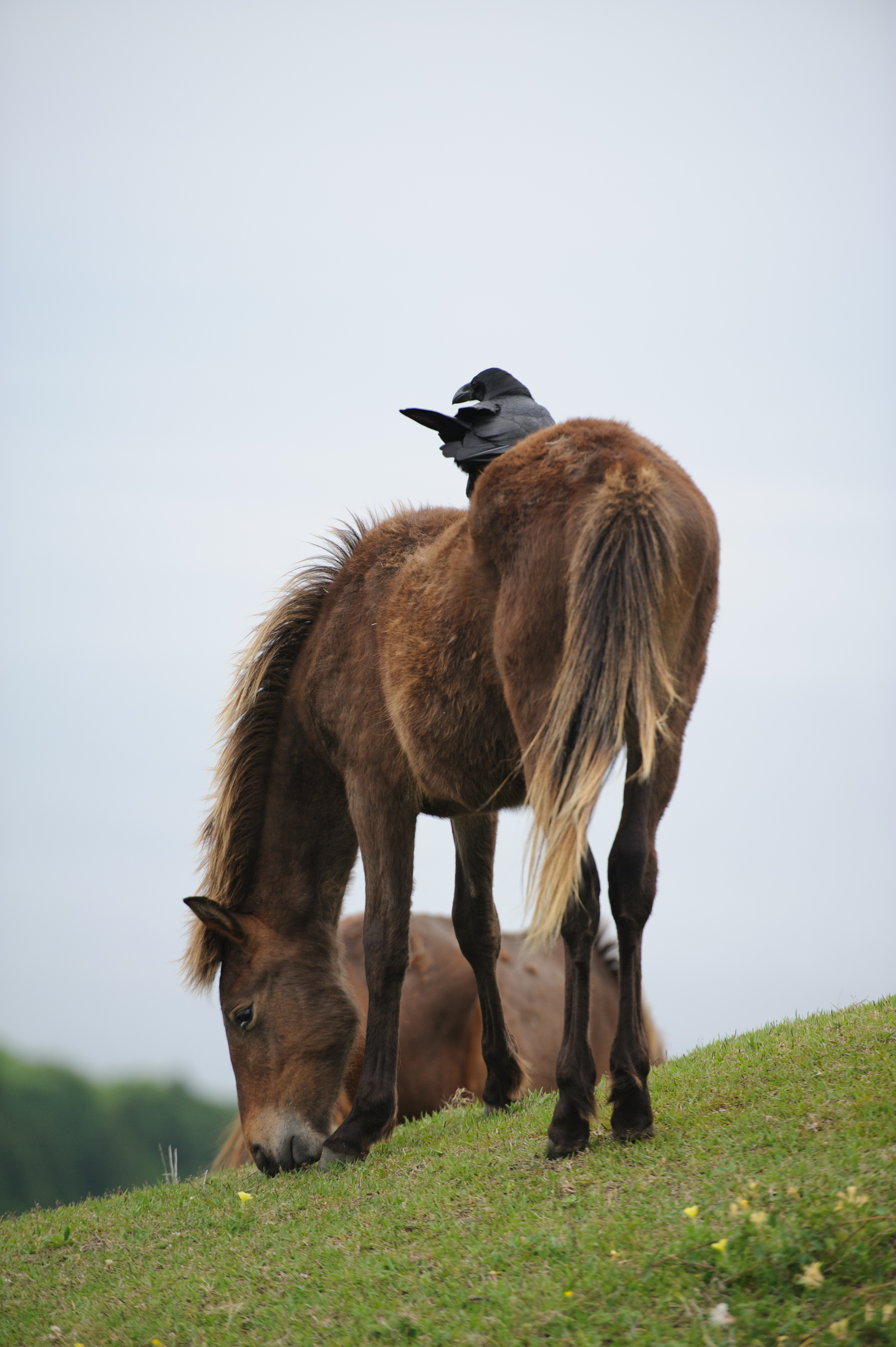 Cheval de race Misaki avec un corbeau posé sur le dos.